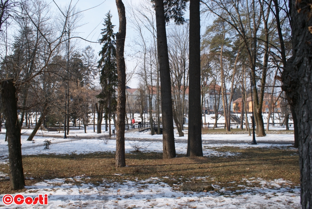 Parcul 04